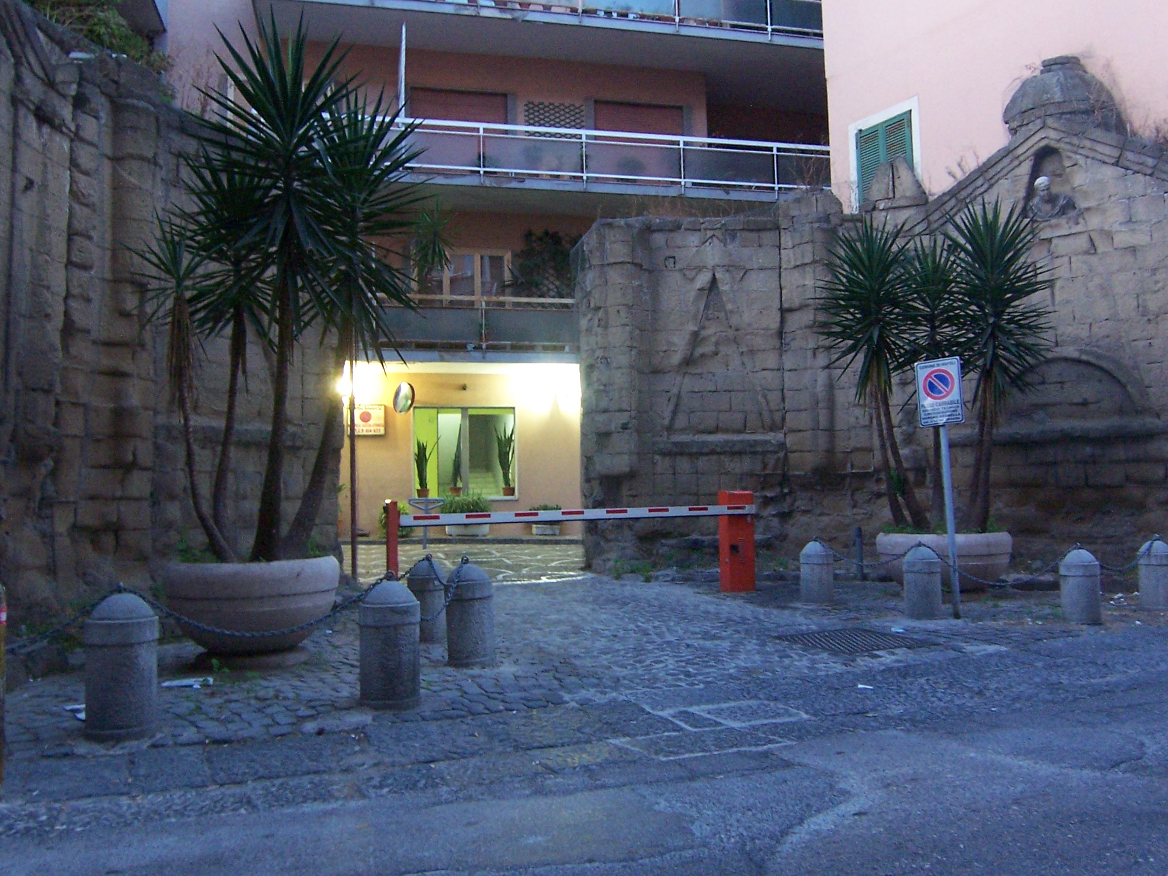 Interlingue: Emiciclo di Villa Carafa di Belvedere, su via Belvedere, Vomero, Napoli